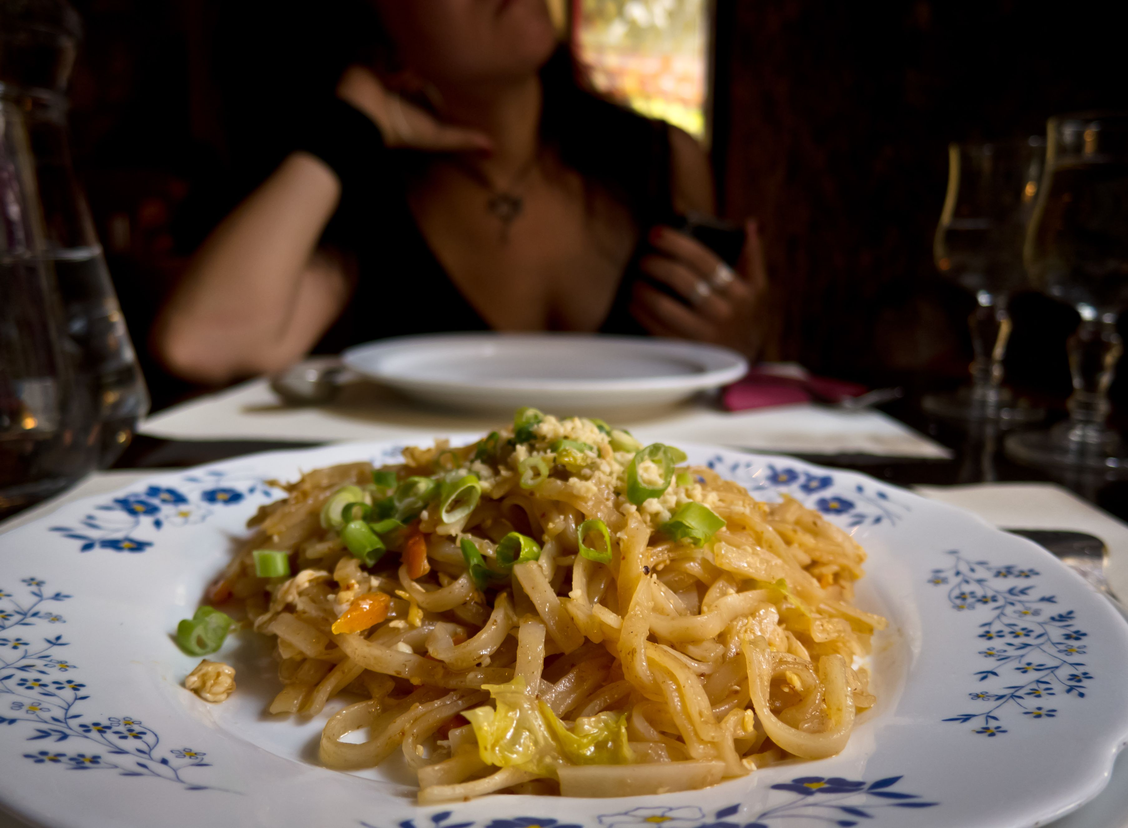 Pad Thai in Madrid